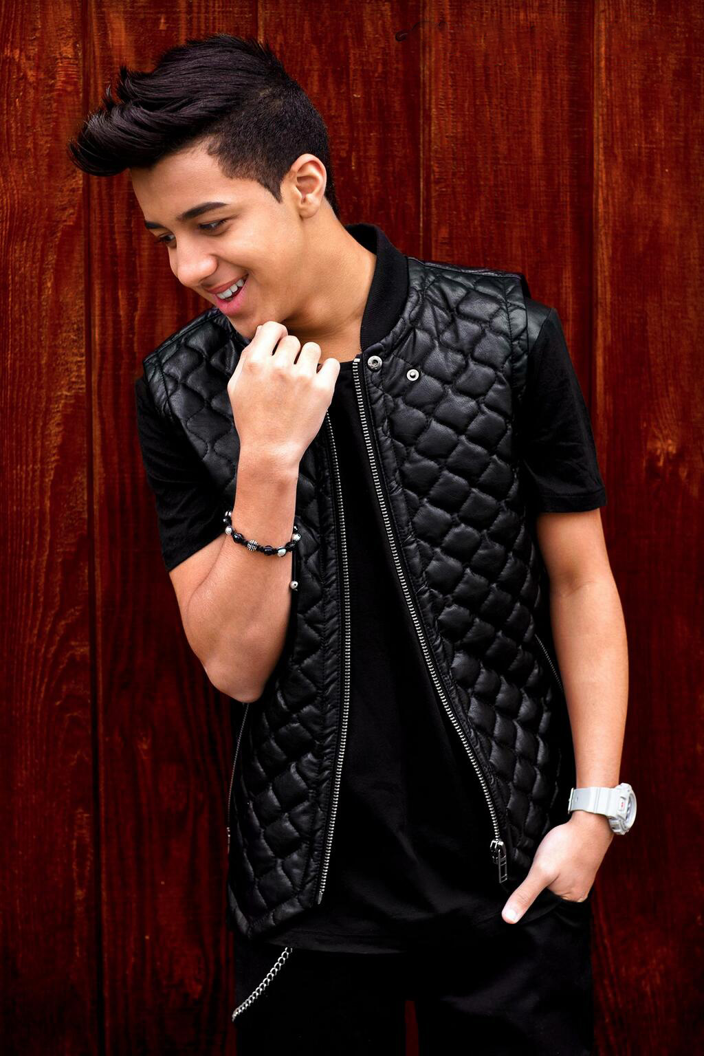 Miguelito el Heredero